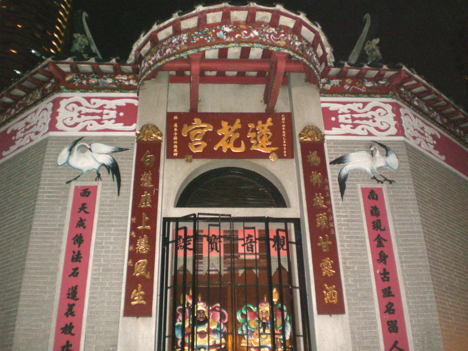 大坑蓮花宮位於大坑蓮花街